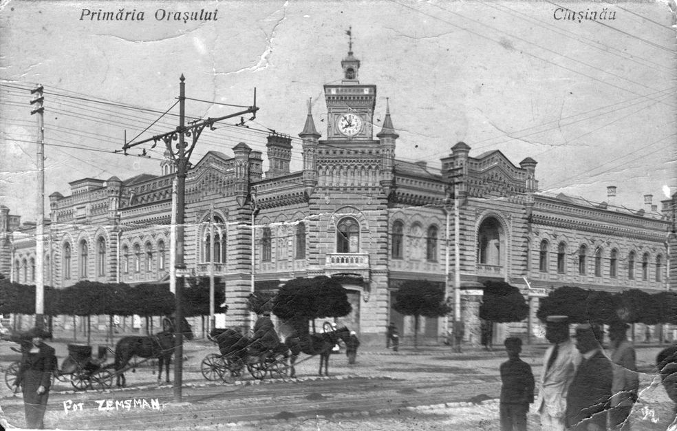 Извозчики на Александровской улице около здания Примэрии, 1930-е годы.